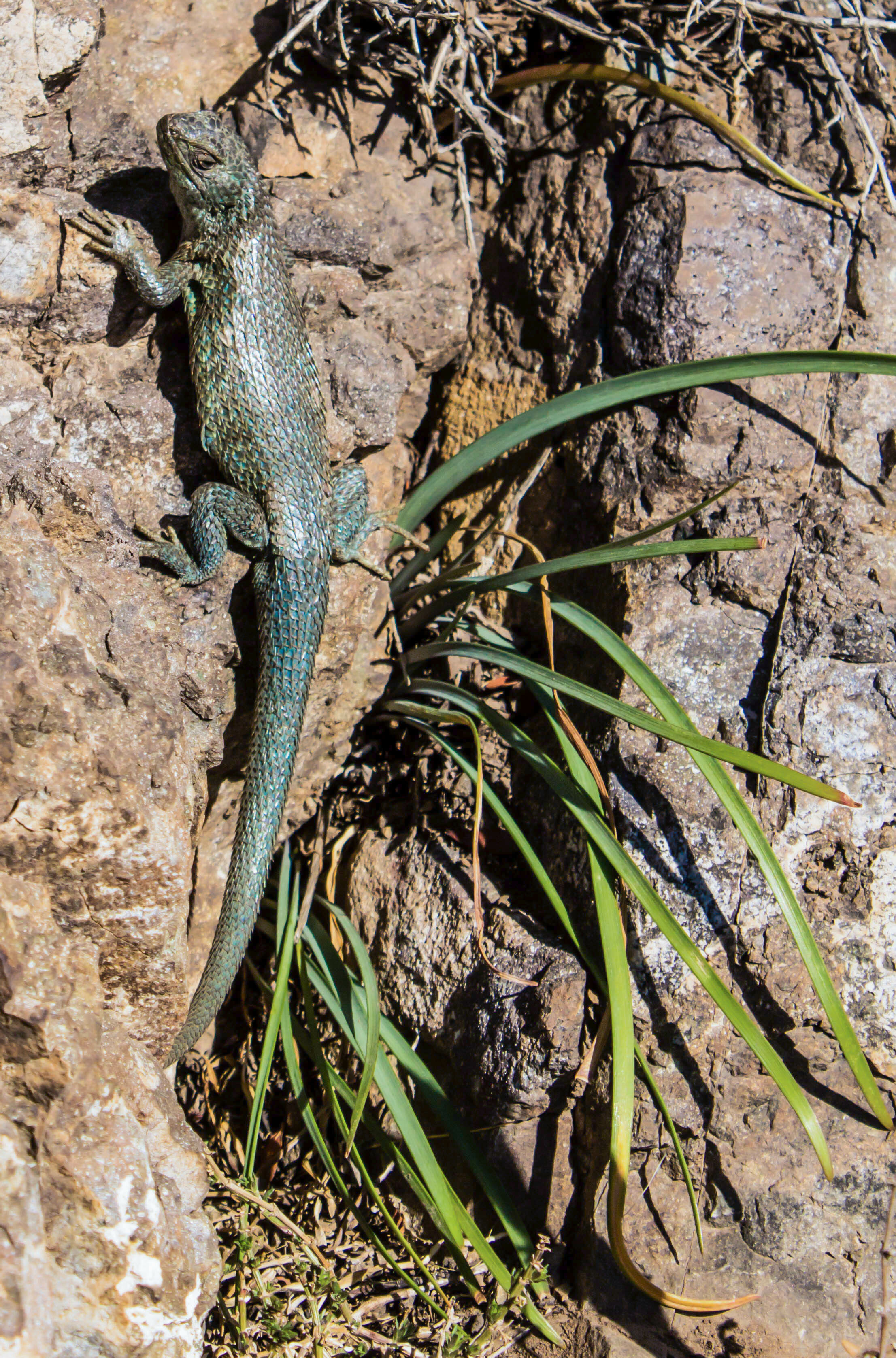 Lagartija de Critián o Liolaemus cristiani en el cerro provincia, Región Metropolitana, Chile.